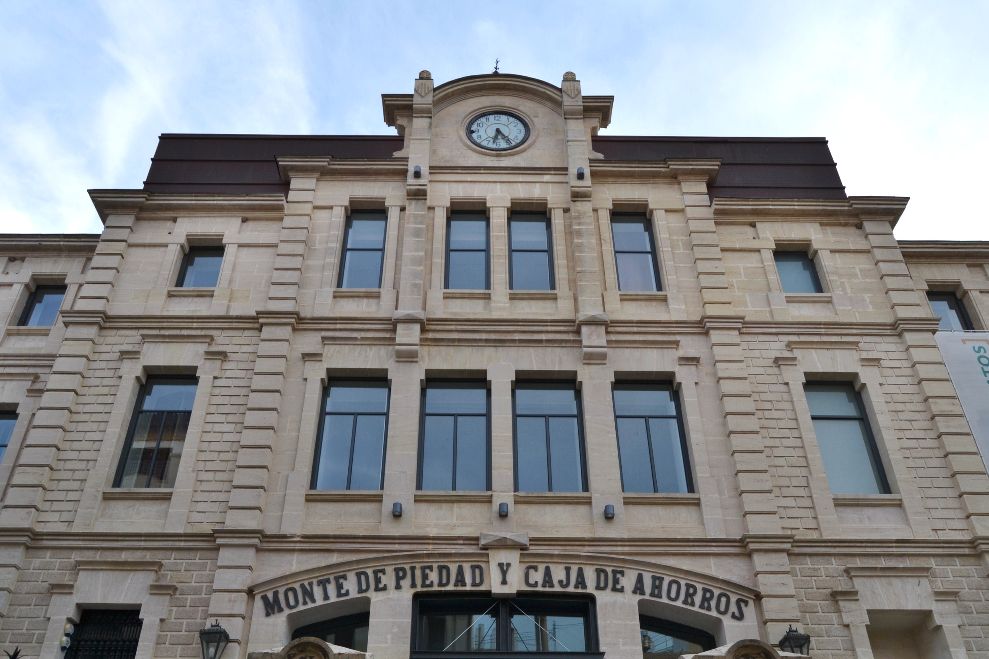 Edifici del Mont de Pietat, centre d'Art d'Alcoi.